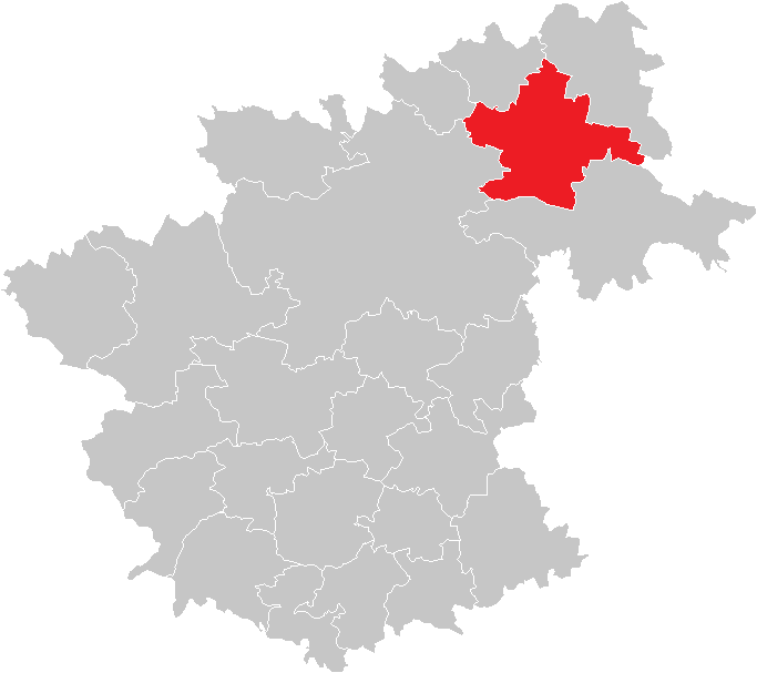 Bezirk Zwettl